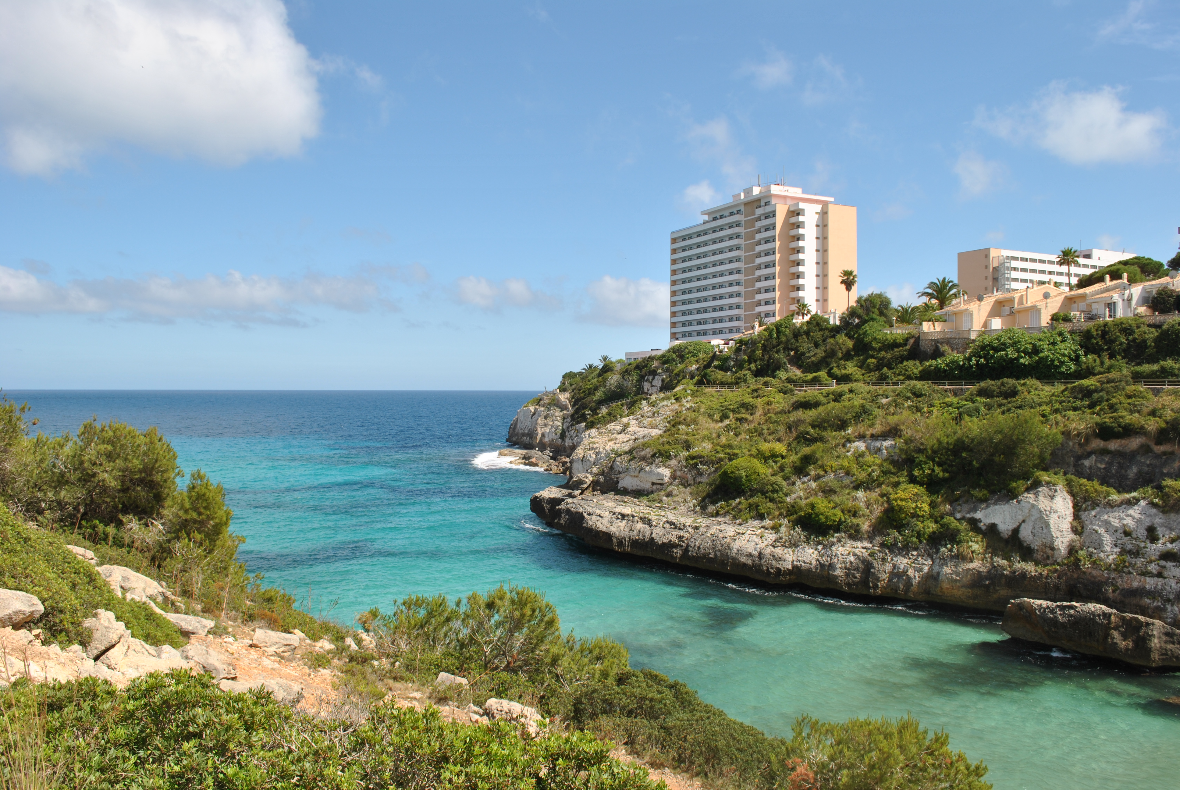 Cala Antena (Manacor) This is a a photo of a beach in the Balearic Islands, Spain, with id: PL-IB-50007